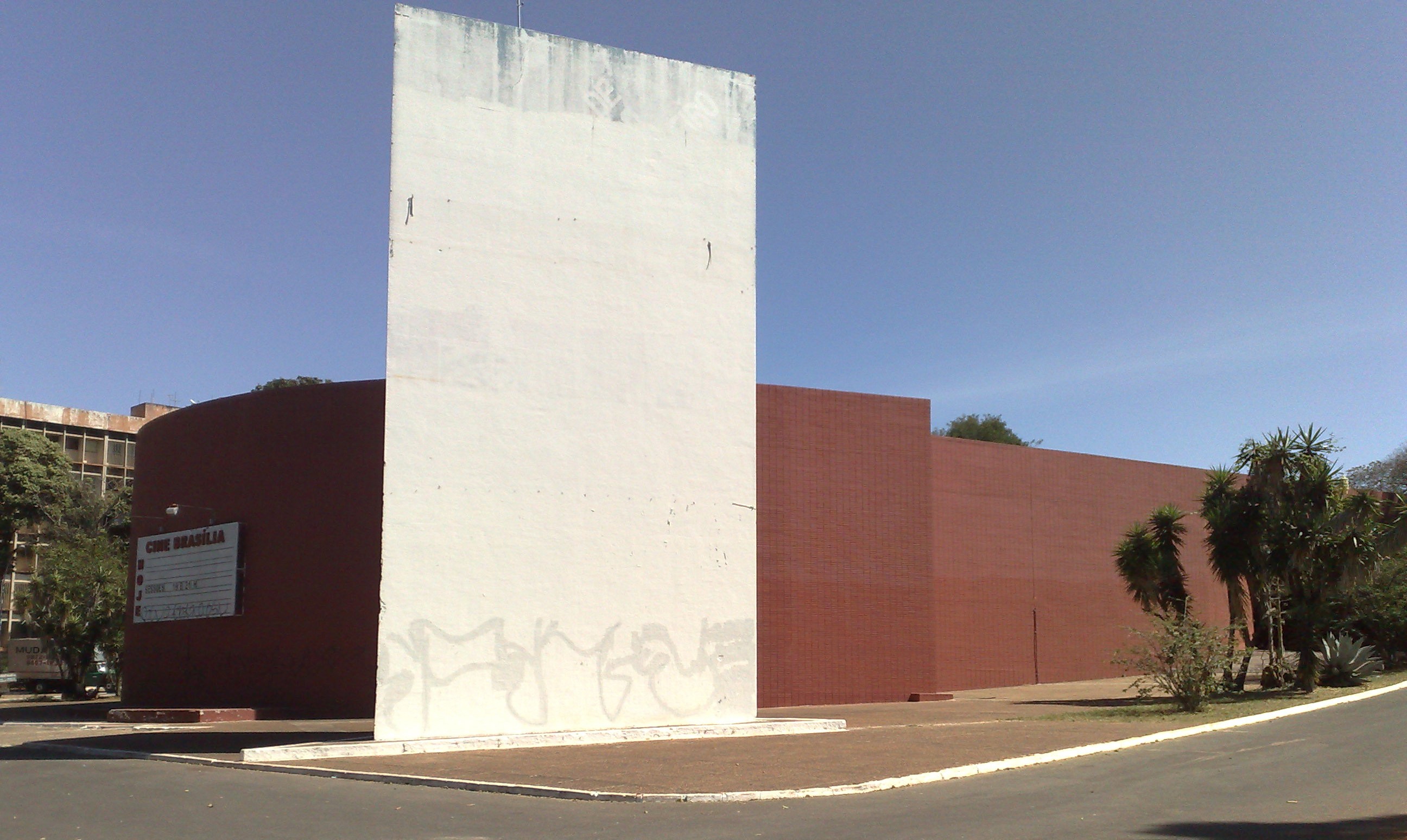 Cine Brasilia, sala de cinema de Brasília, DF